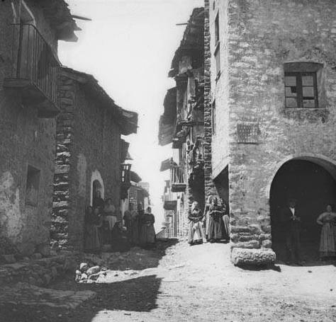 Carrer de Vilamur amb gent. Frederic Bordas i Altarriba (ca. 1890)